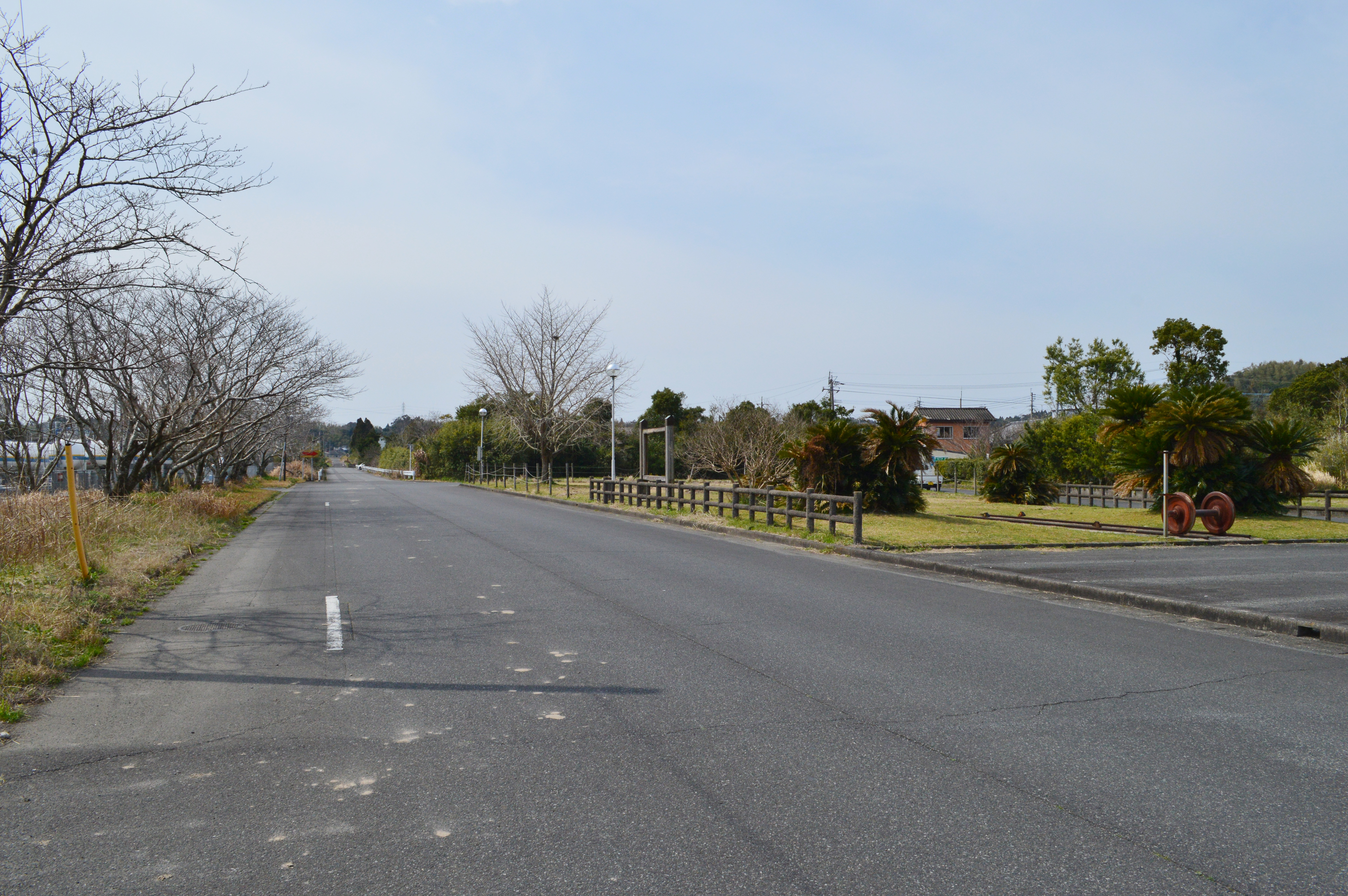 東串良駅跡